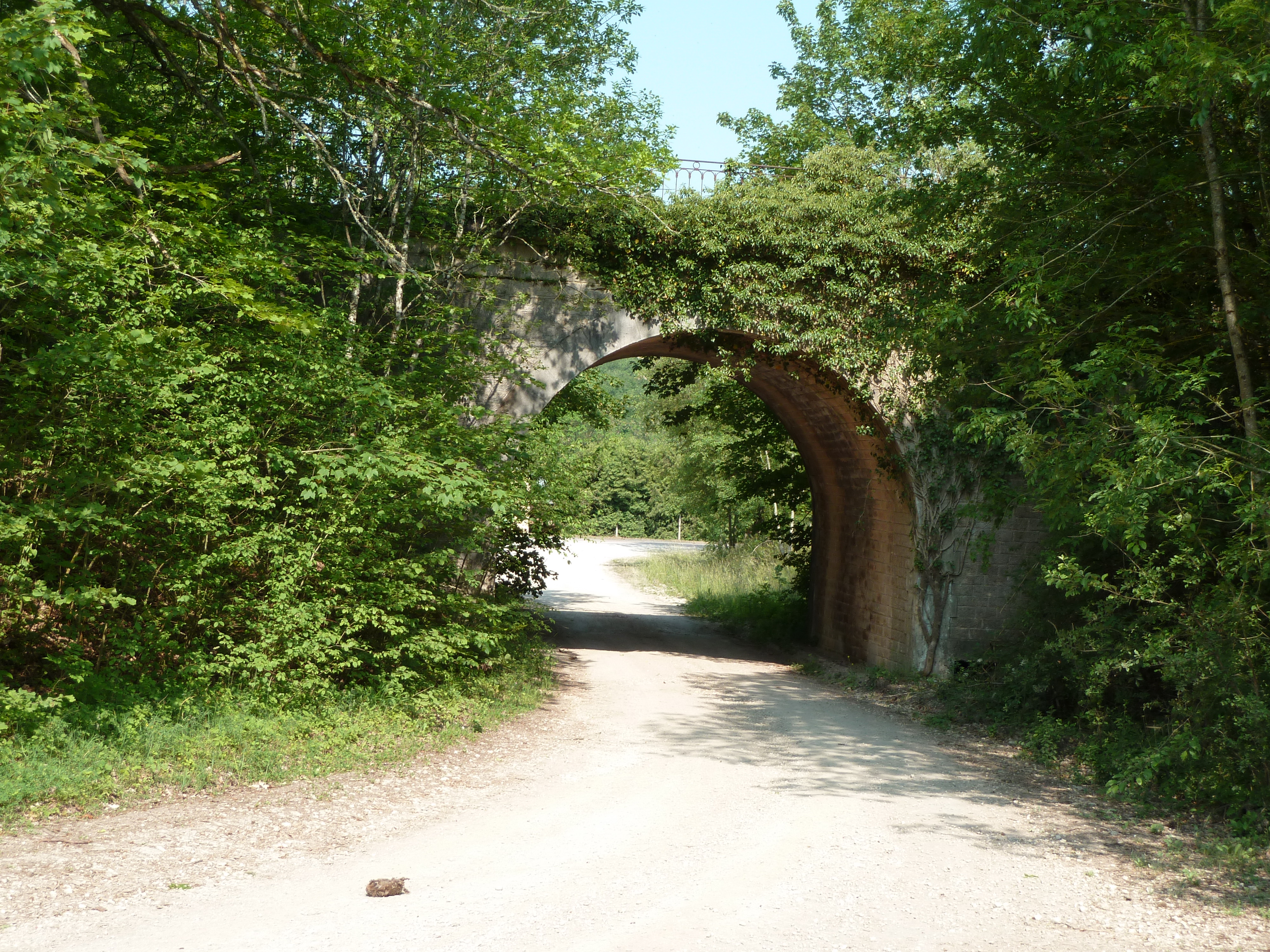 Tunnel sous la ligne de chemin de fer désaffectée de Sorcy à Wassy et Montier-en-Der (Ligne Jessains - Sorcy), qui passait par Void, Sauvoy, Mauvages, Gondrecourt-le-Château, Luméville-Chassey, etc... Le service voyageur y sera supprimé le 01.07.1938, et le fret le 17.05.1953.